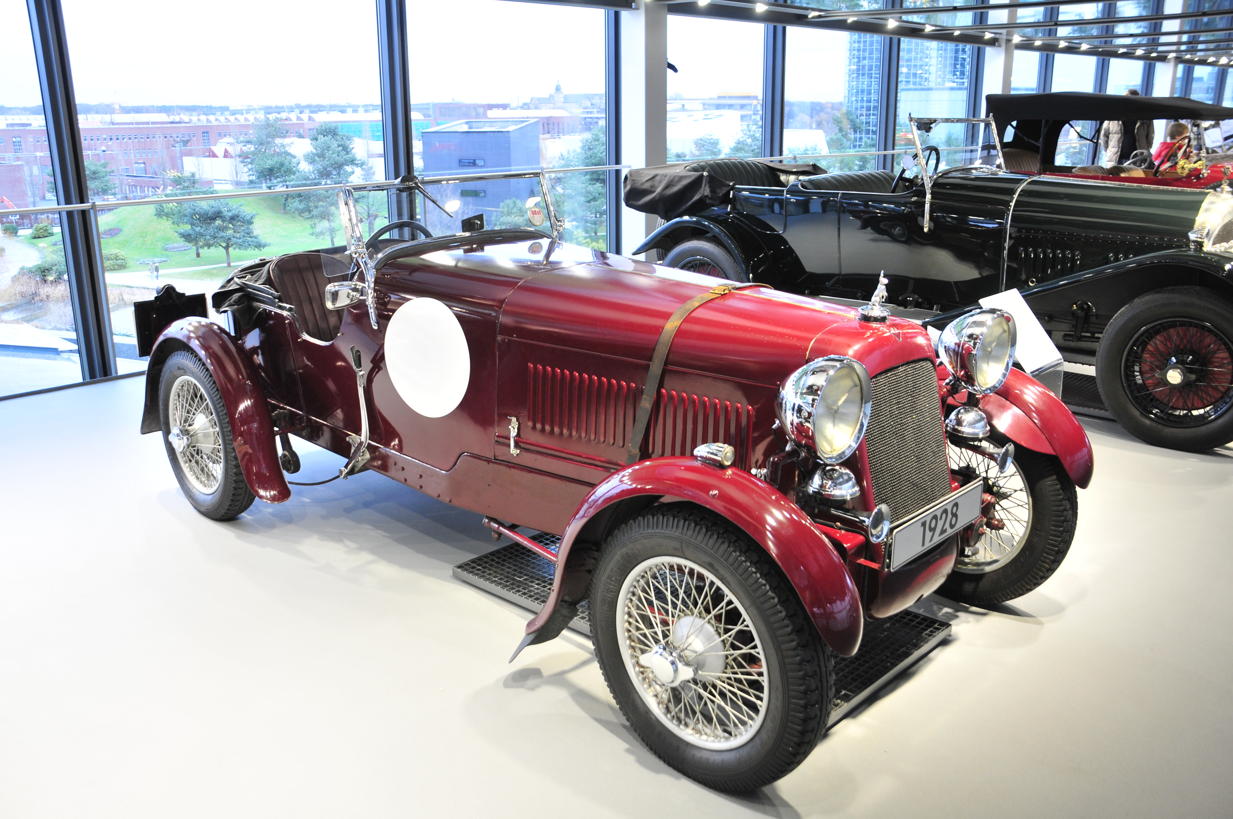 Alvis 12/75 "Tourist Trophy Replica" (1928) in der Autostadt Wolfsburg